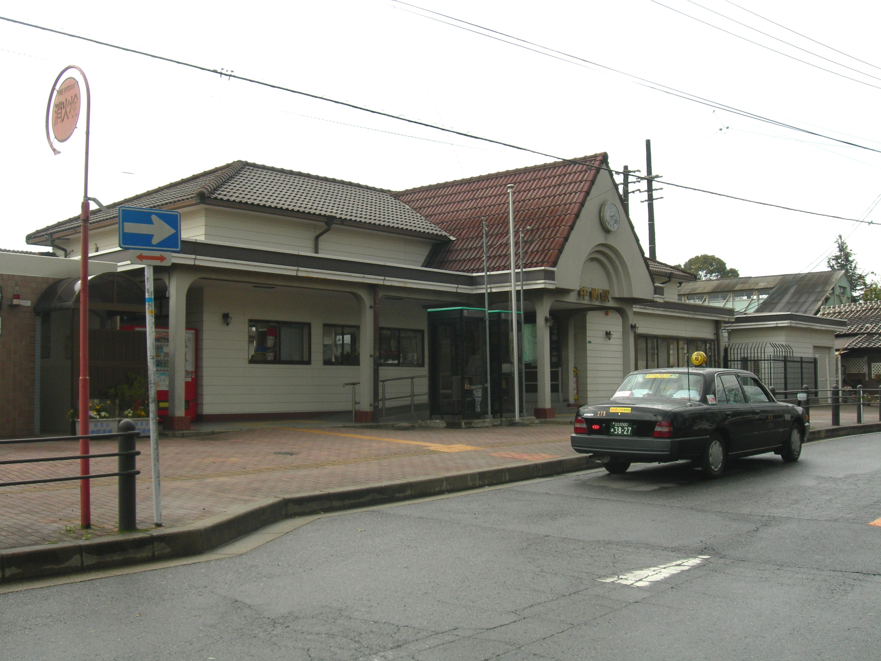 中間駅